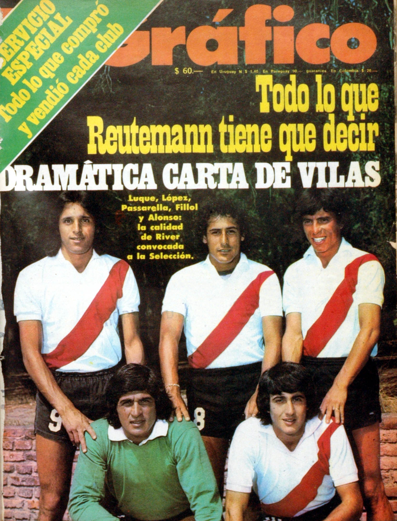 El Grafico del 04 de Febrero de 1976. Edicion 2939